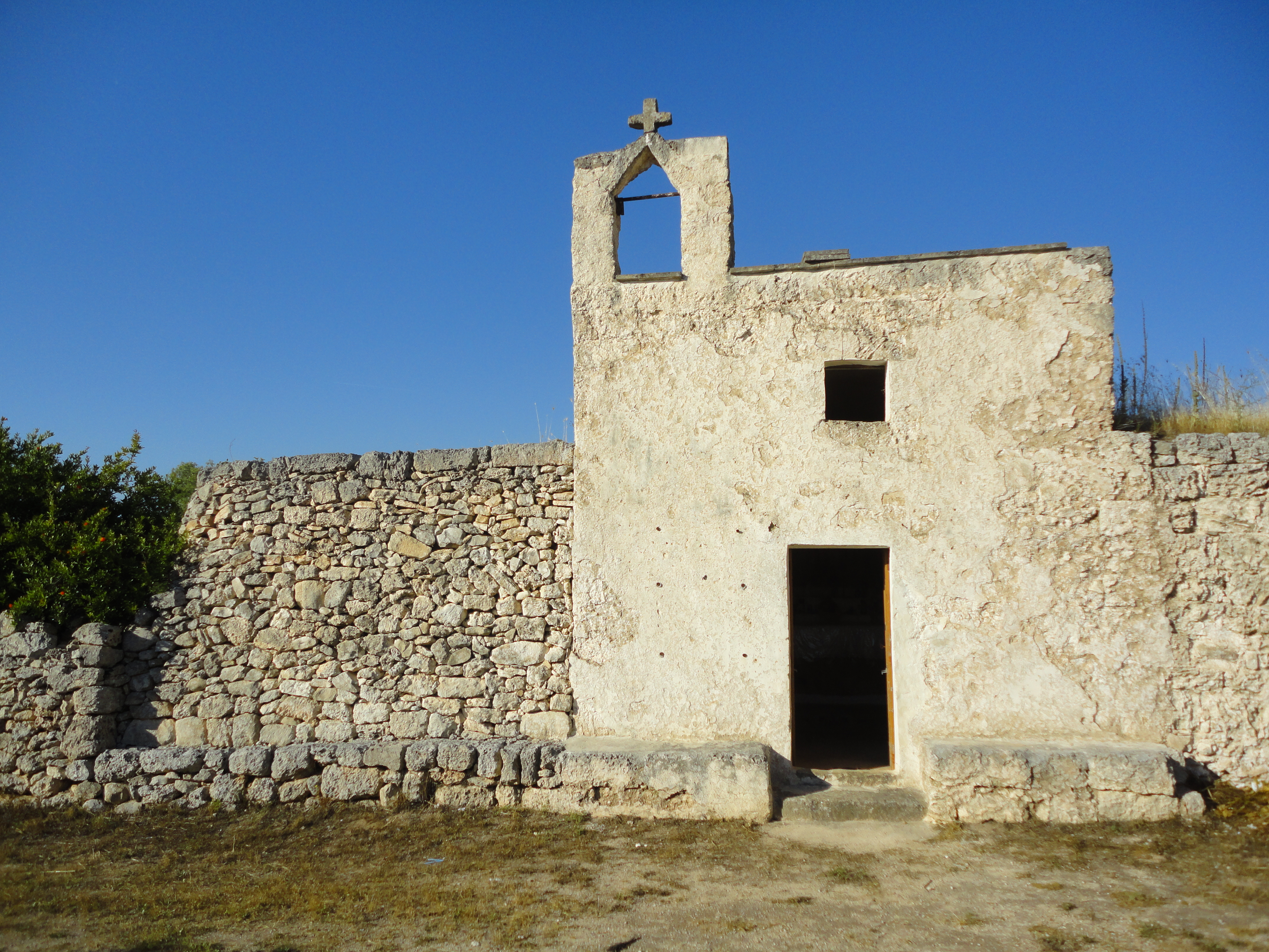 Cristo di Tabelle Galatone, Lecce